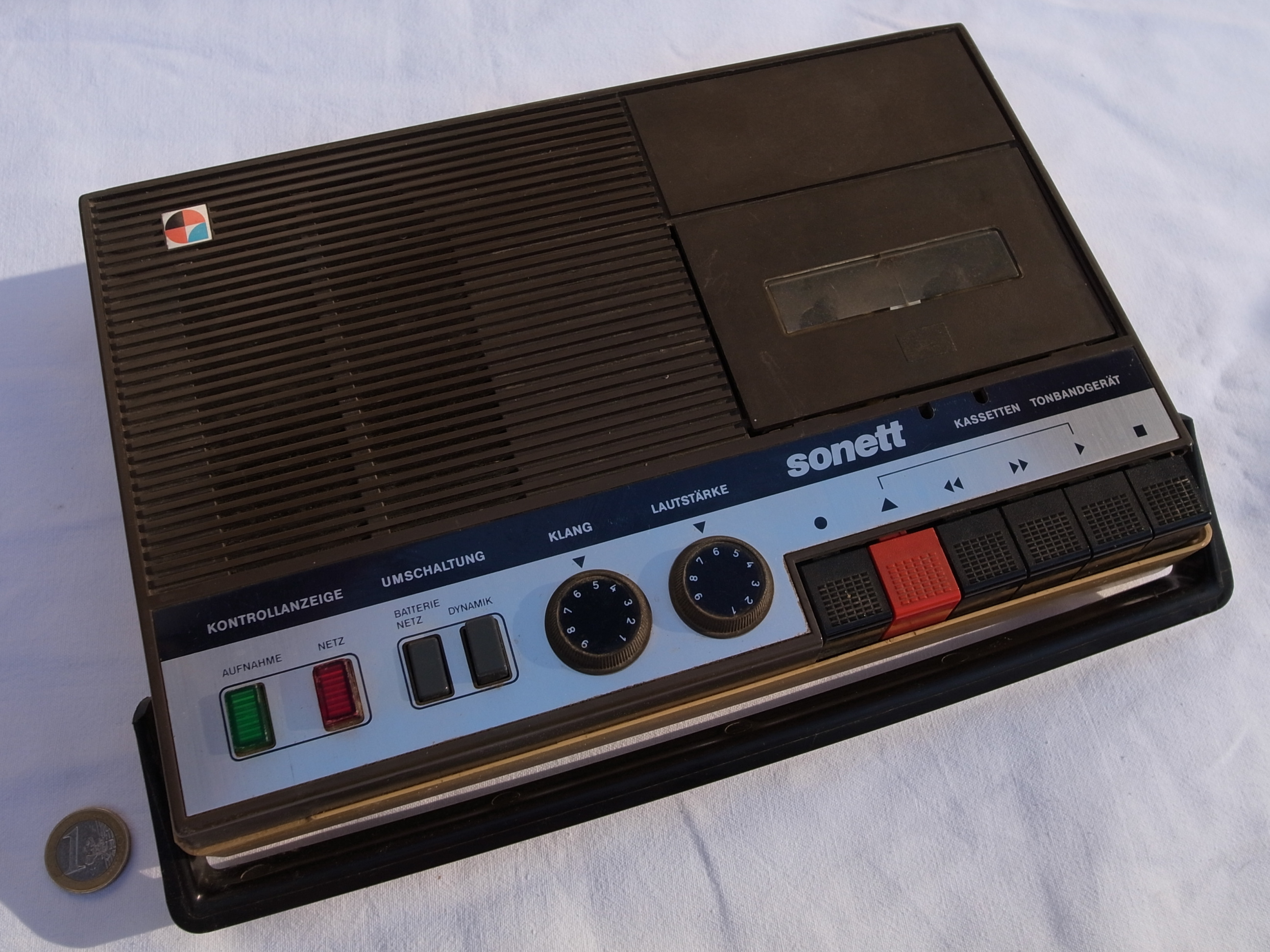 Sonett Kassetten Tonbandgerät, VEB Sternradio Sonneberg